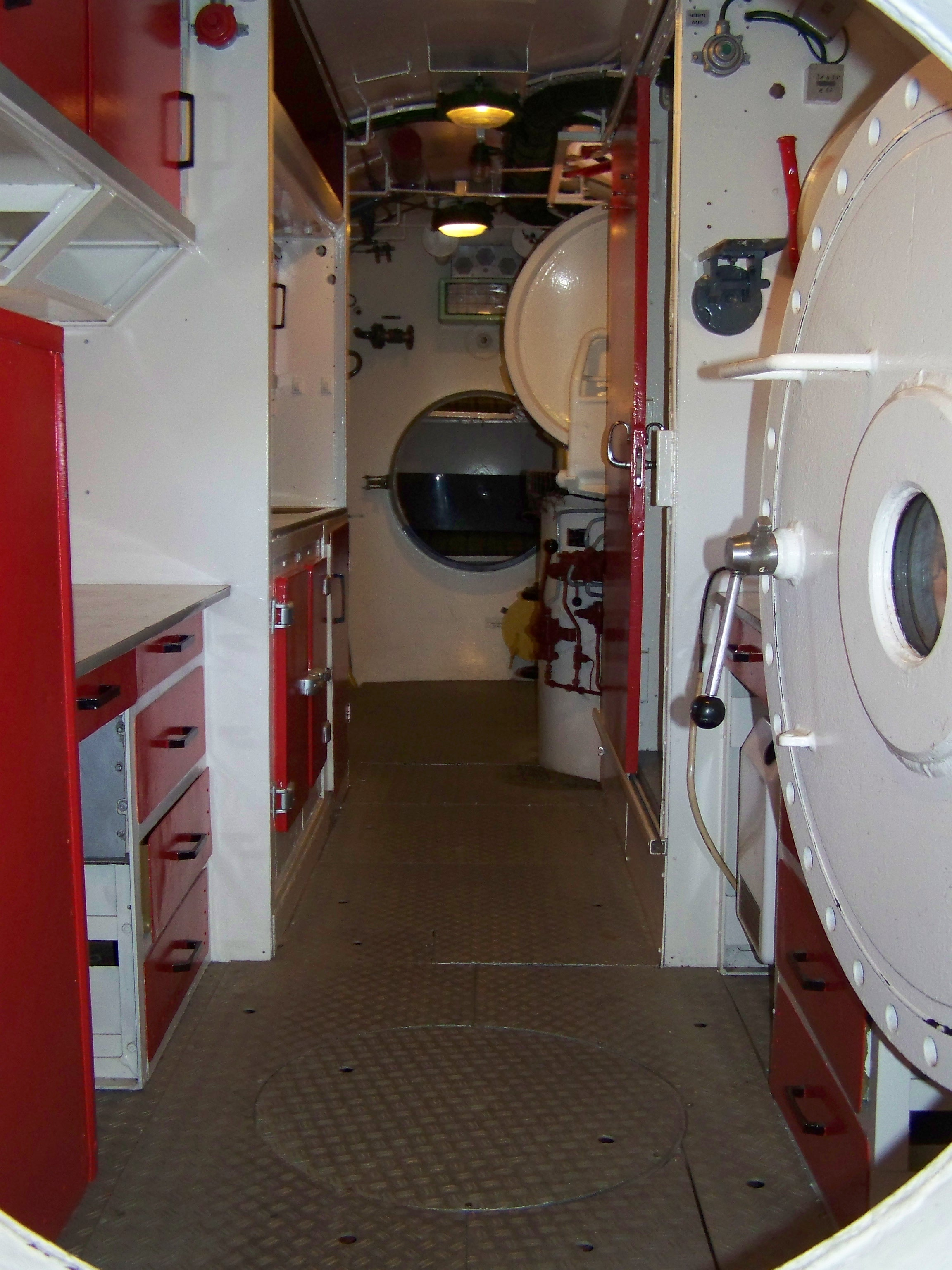 UWL Helogoland im Nautineum Dänholm, Stralsund, Innenansicht (2008-05-10)